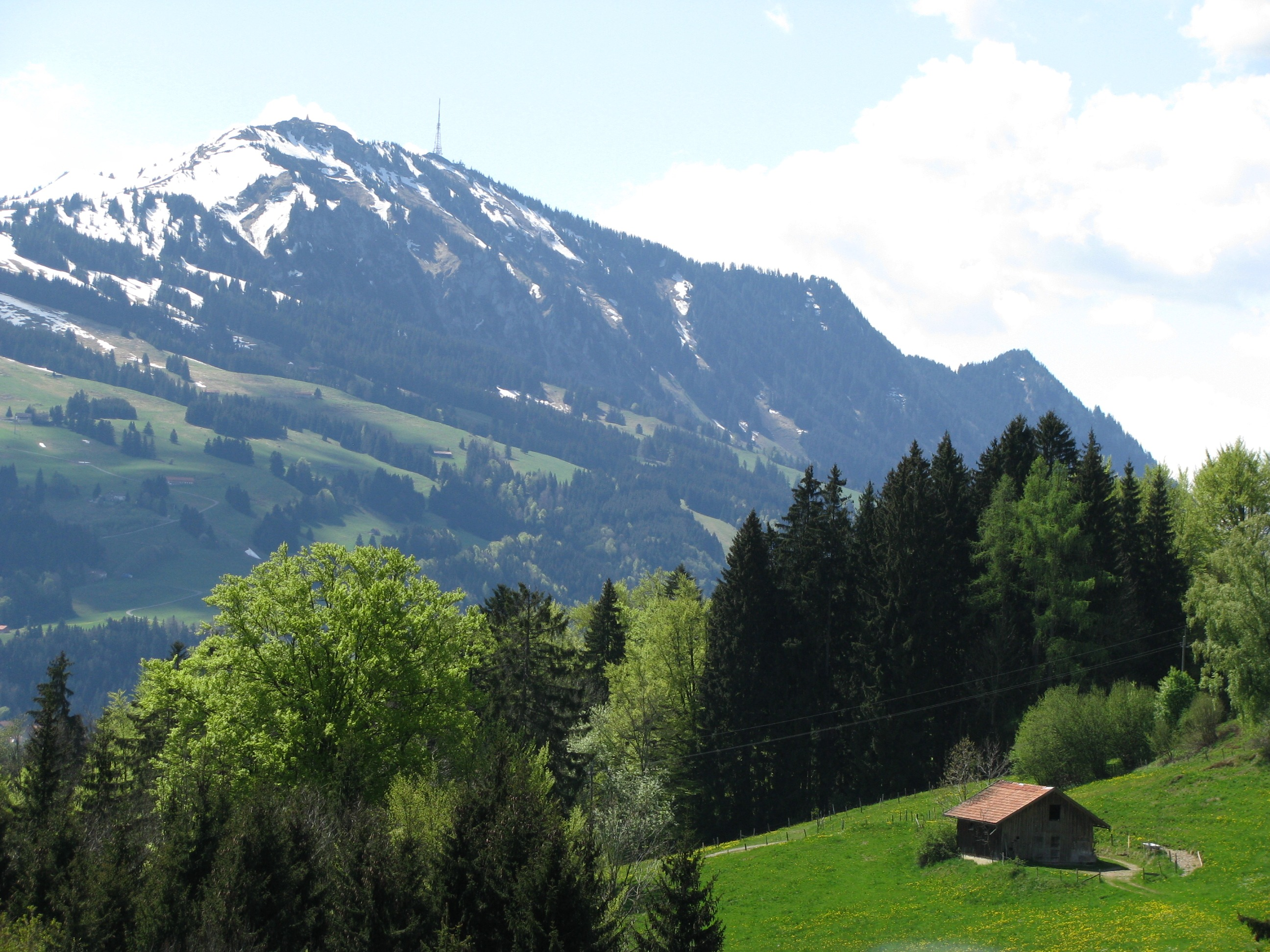 Grünten vom Rottachberg aus gesehen